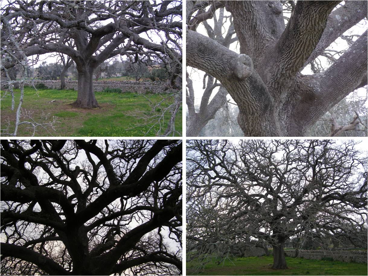 tricase